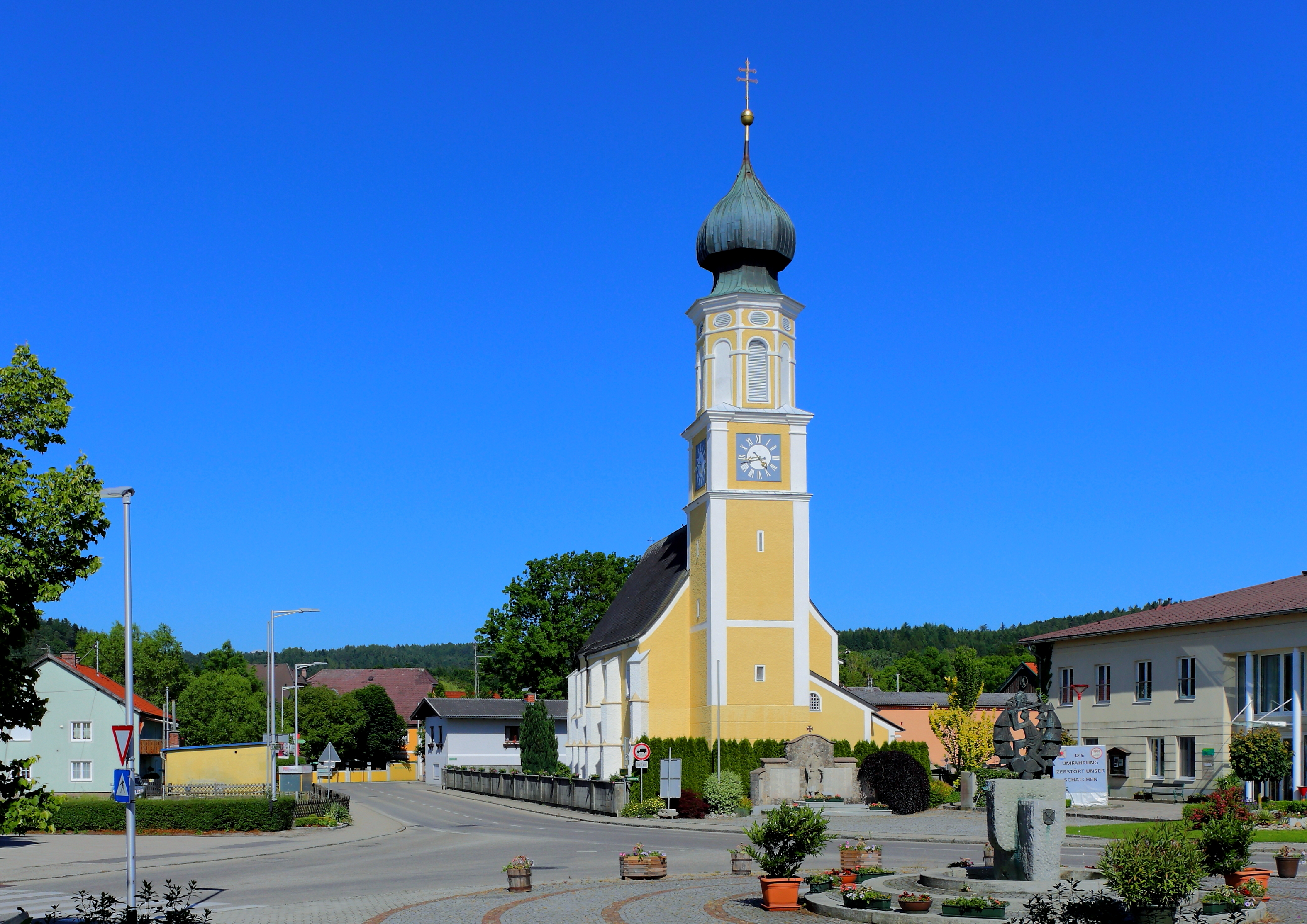 Westansicht des Dorfplatzes mit der katholischen Pfarrkirche hl. Jakob der oberösterreichischen Gemeinde Schalchen.